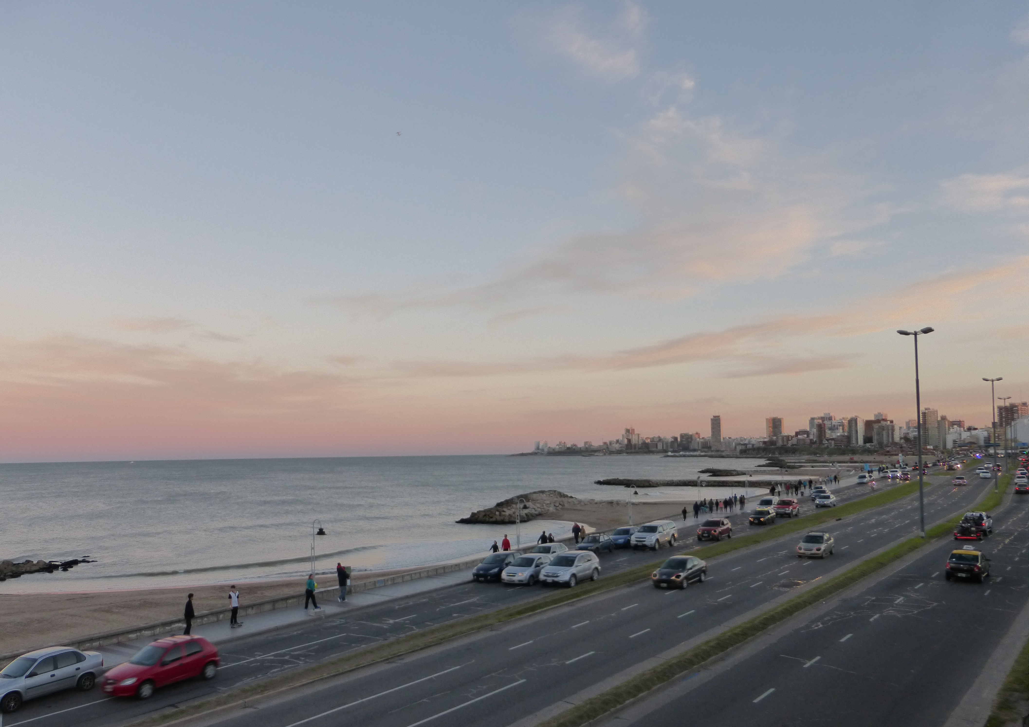 Vista del Boulevard Marítimo Peralta Ramos en su intersección con la calle Río Negro, en Mar del Plata, Argentina.